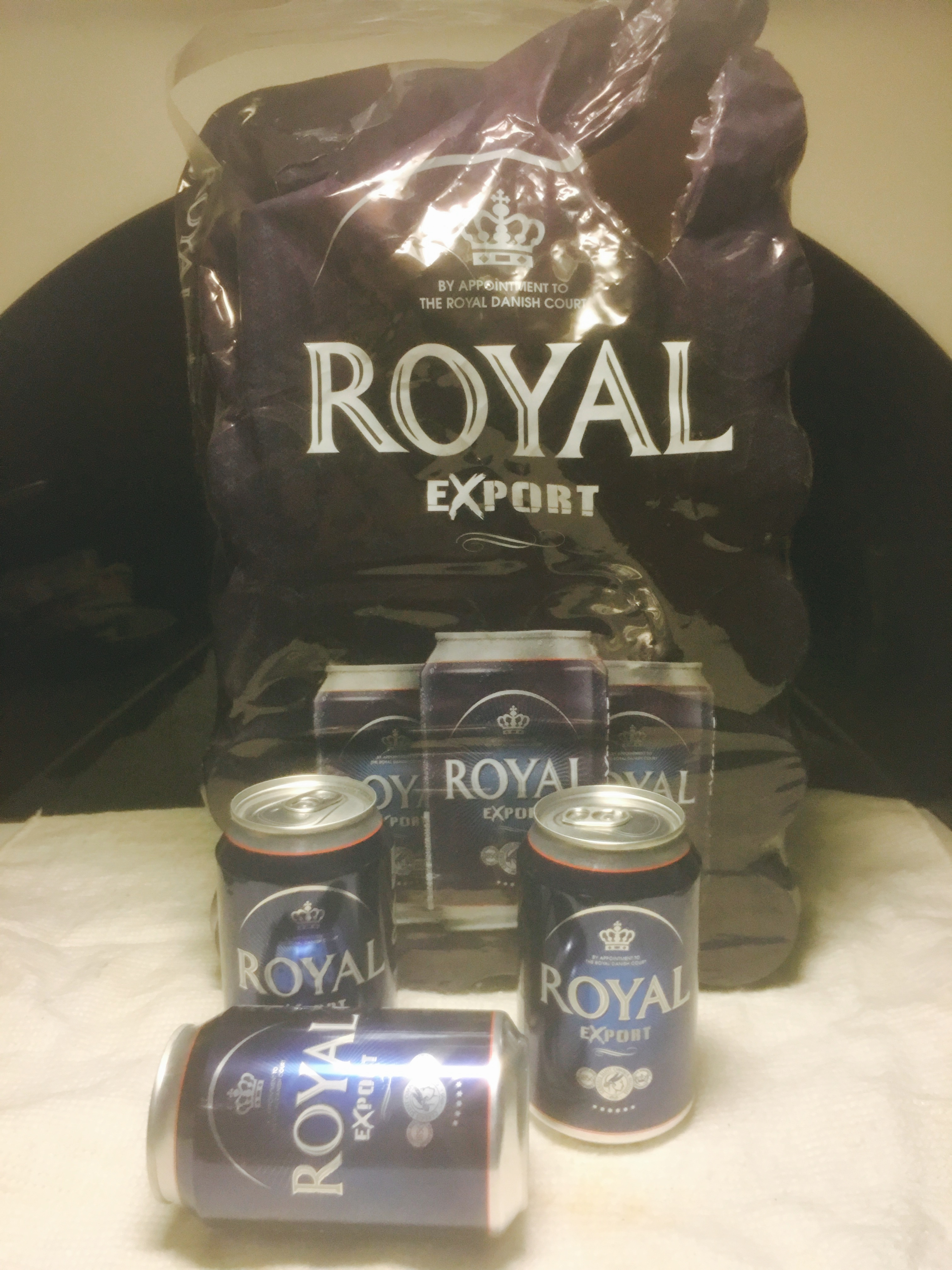 Royal Export dåseøl fra Danmark.